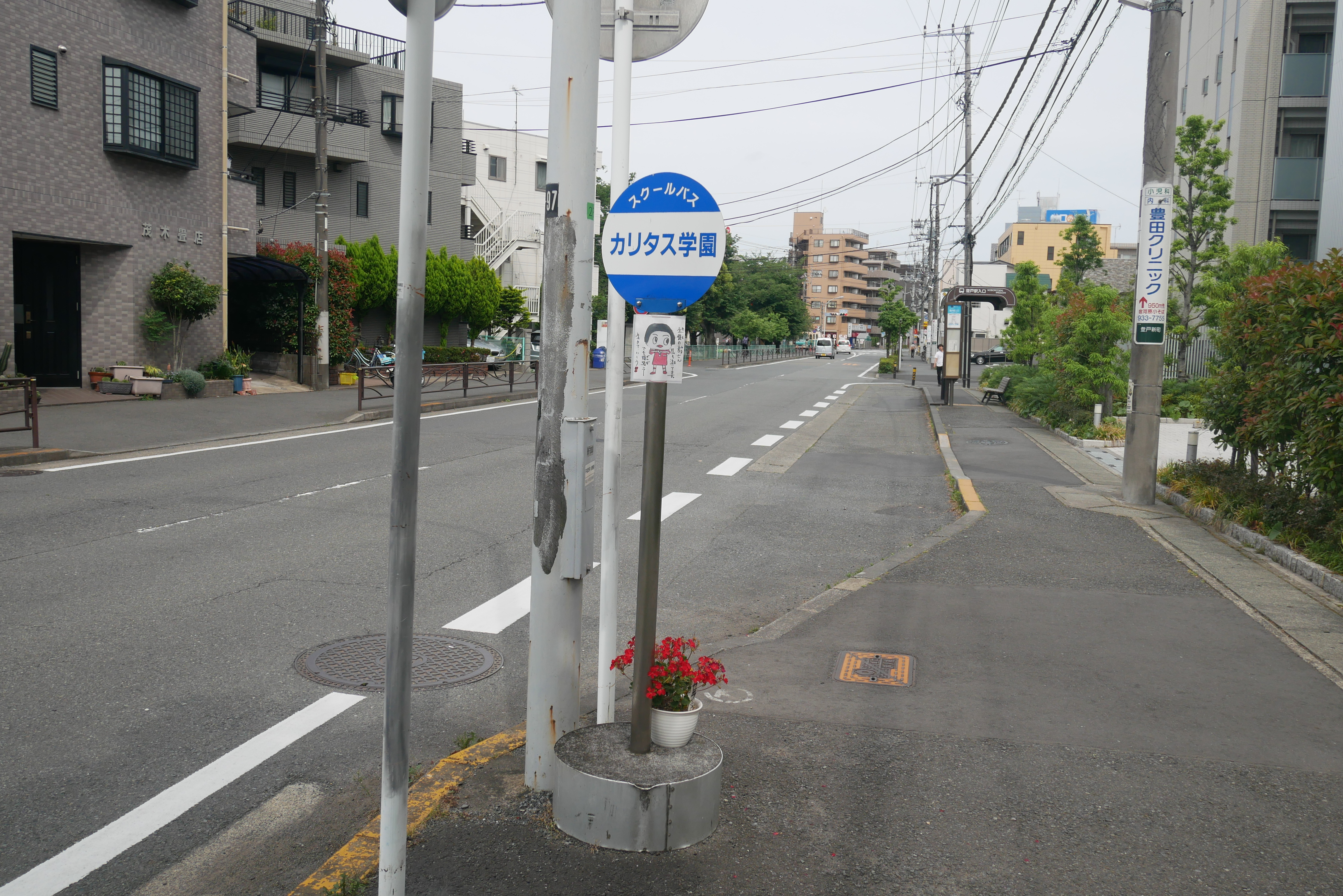 Kawasaki stabbings bus stop (川崎殺傷事件現場) Panasonic Lumix DMC-GX7 Mark II